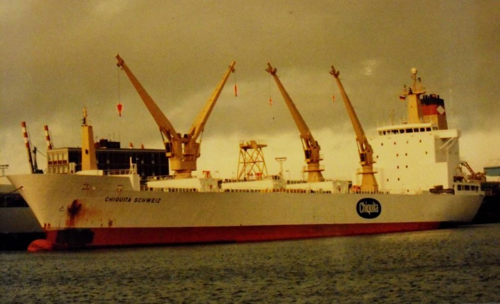 Chiquita Schweiz IMO Number: 9015216 MMSI Number: 308124000 Callsign: C6KD9 Length: 158 m Beam: 24 m